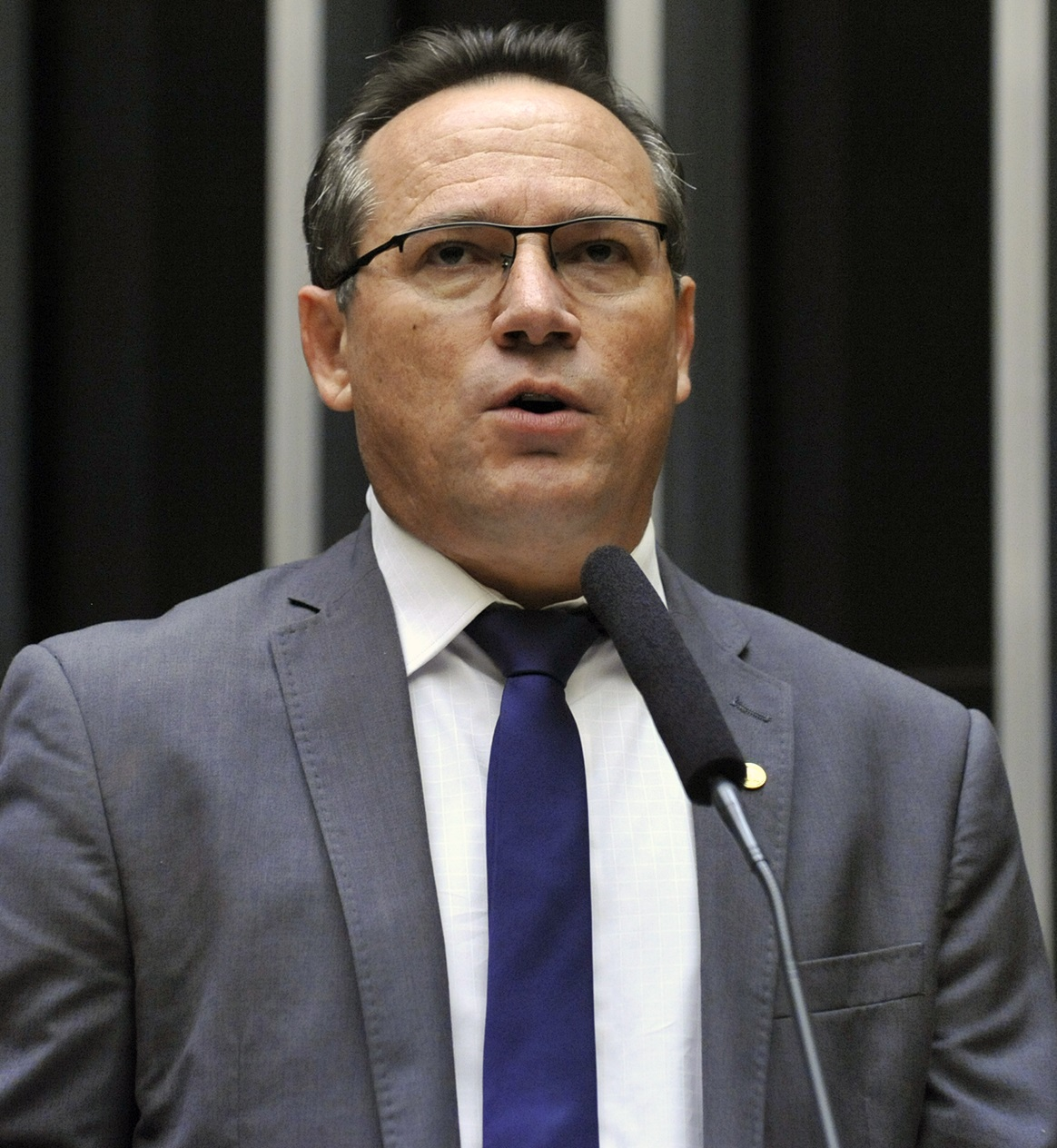 Remídio Monai em maio de 2016.